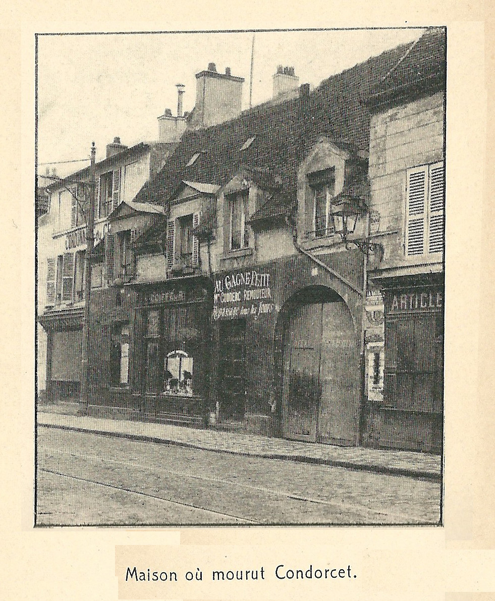 Bourg-la-Reine (Seine, France) ; maison où mourut Condorcet.